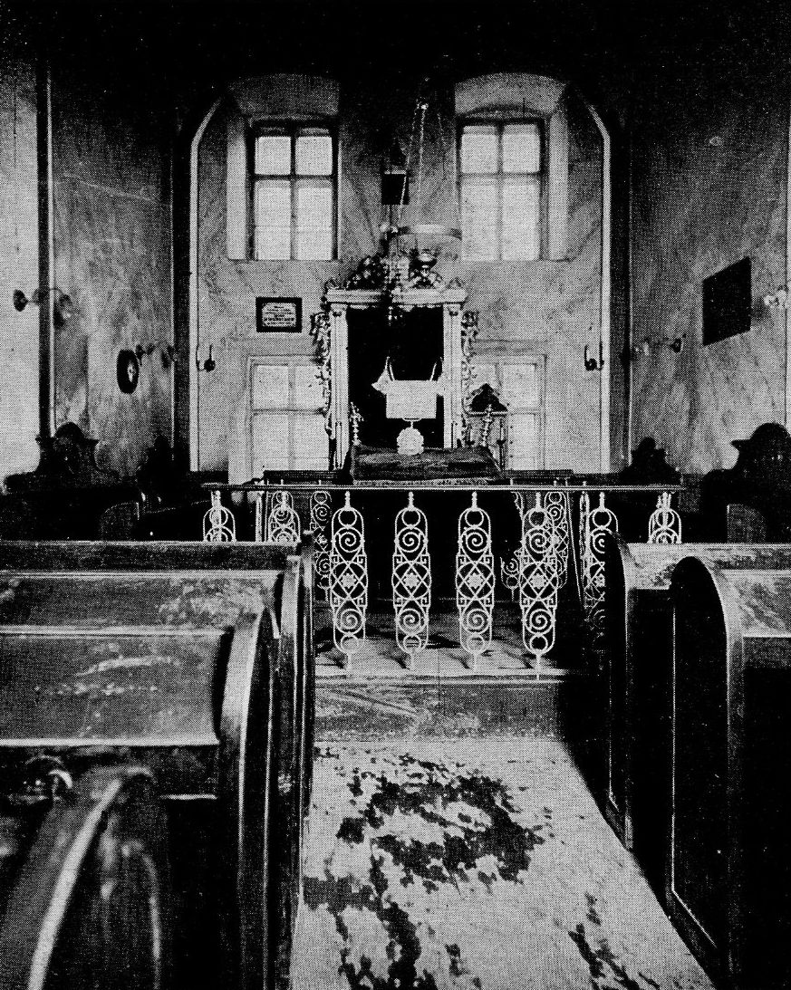 Interiér synagogy Polský templ v Brně